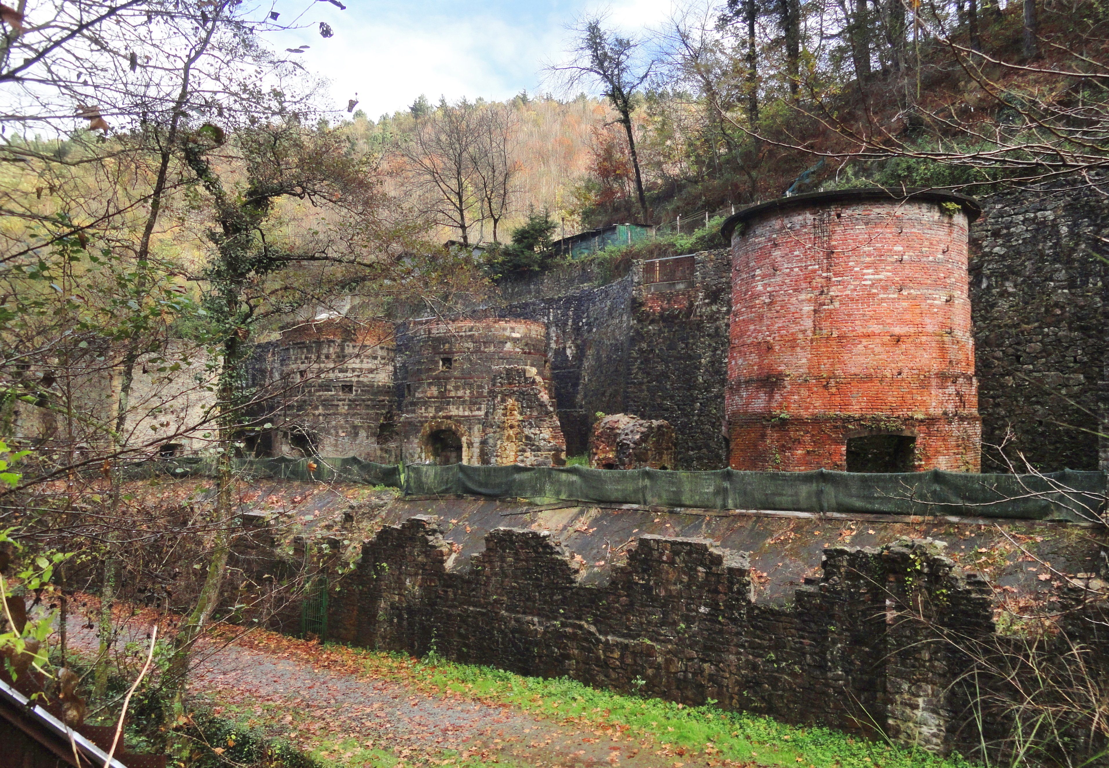 Irugurutzeta labeak - Irun